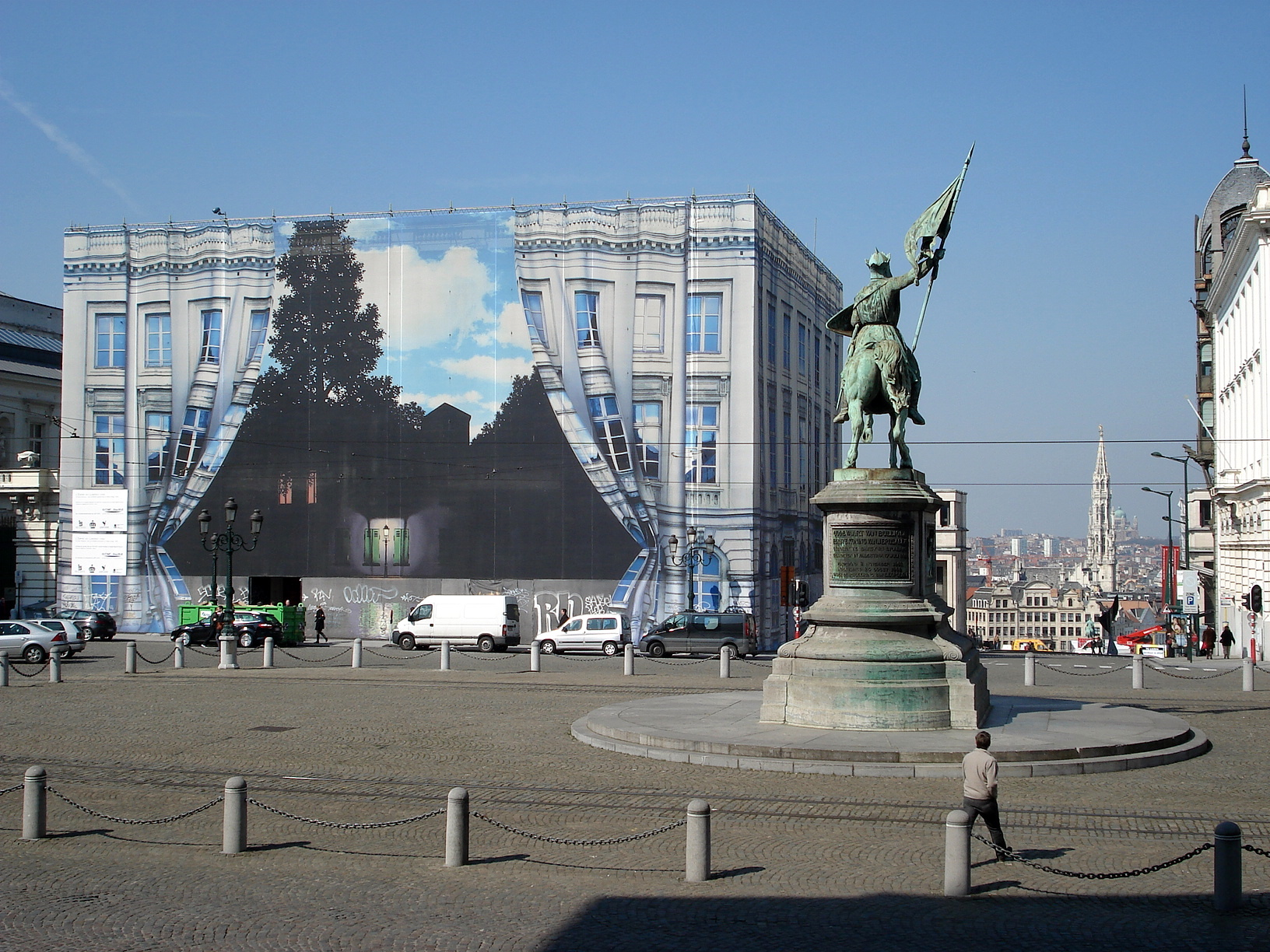 Musée Magritte, place Royale, à Bruxelles. À l'avant-plan, statue équestre de Godefroid de Bouillon. À l'arrière-plan à droite, flèche de l'hôtel de ville. Un peu plus à droite, à l'horizon, basilique de Koekelberg (coupole verte).